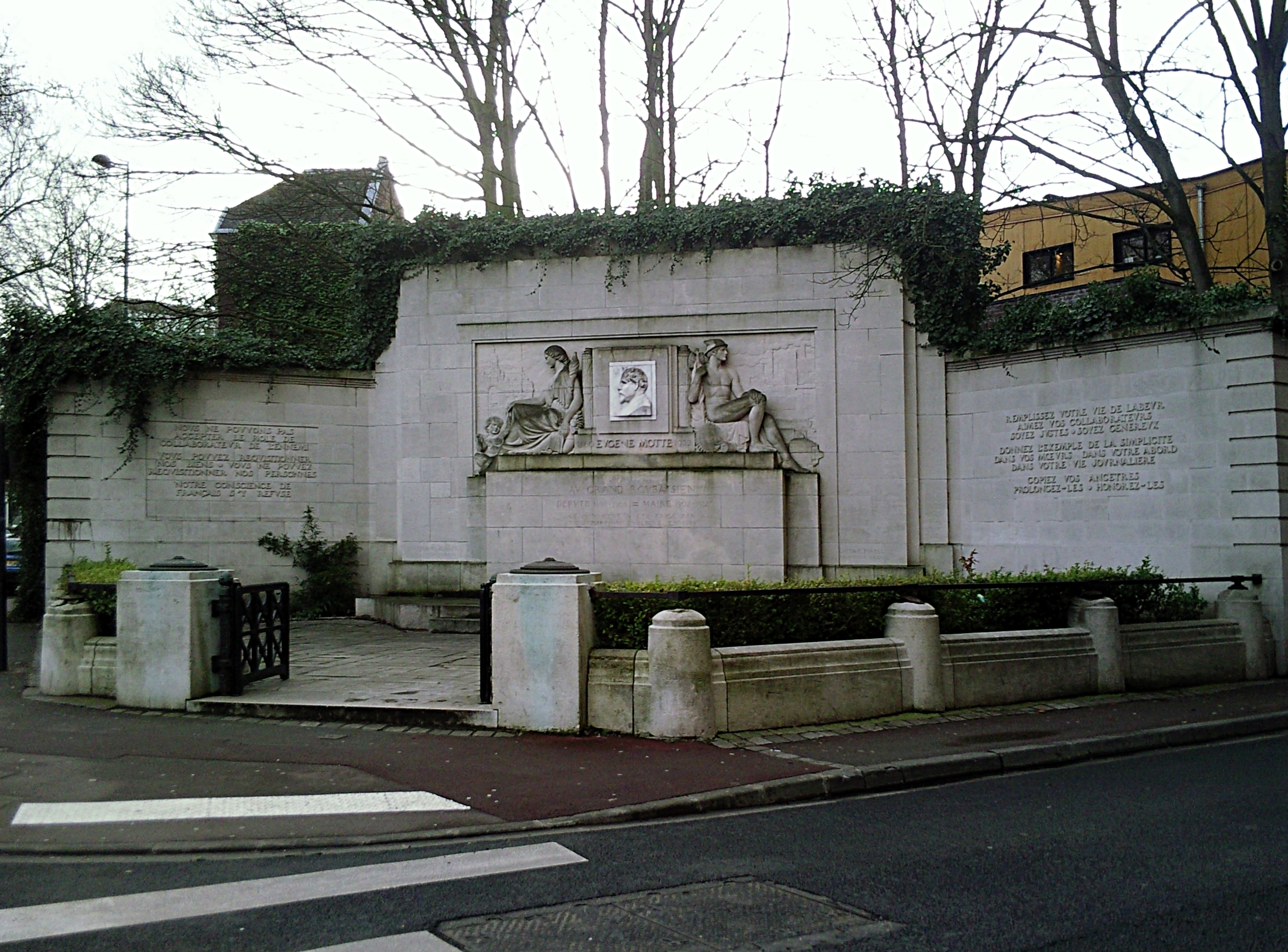 Le monument à la mémoire d'Eugène Motte à Roubaix, maire de la ville de 1902 à 1912.